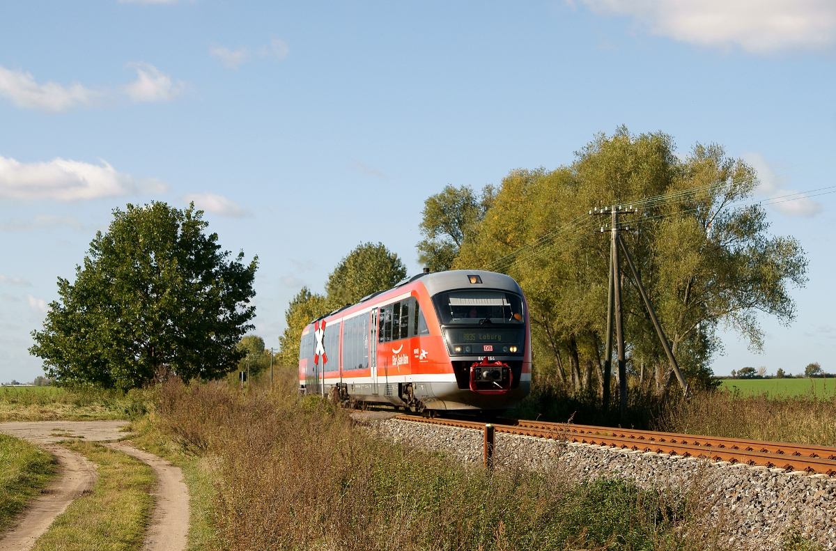 Triebwagen 642 164 auf der Fahrt von Magdeburg nach Loburg am 13.10.2011 bei Büden